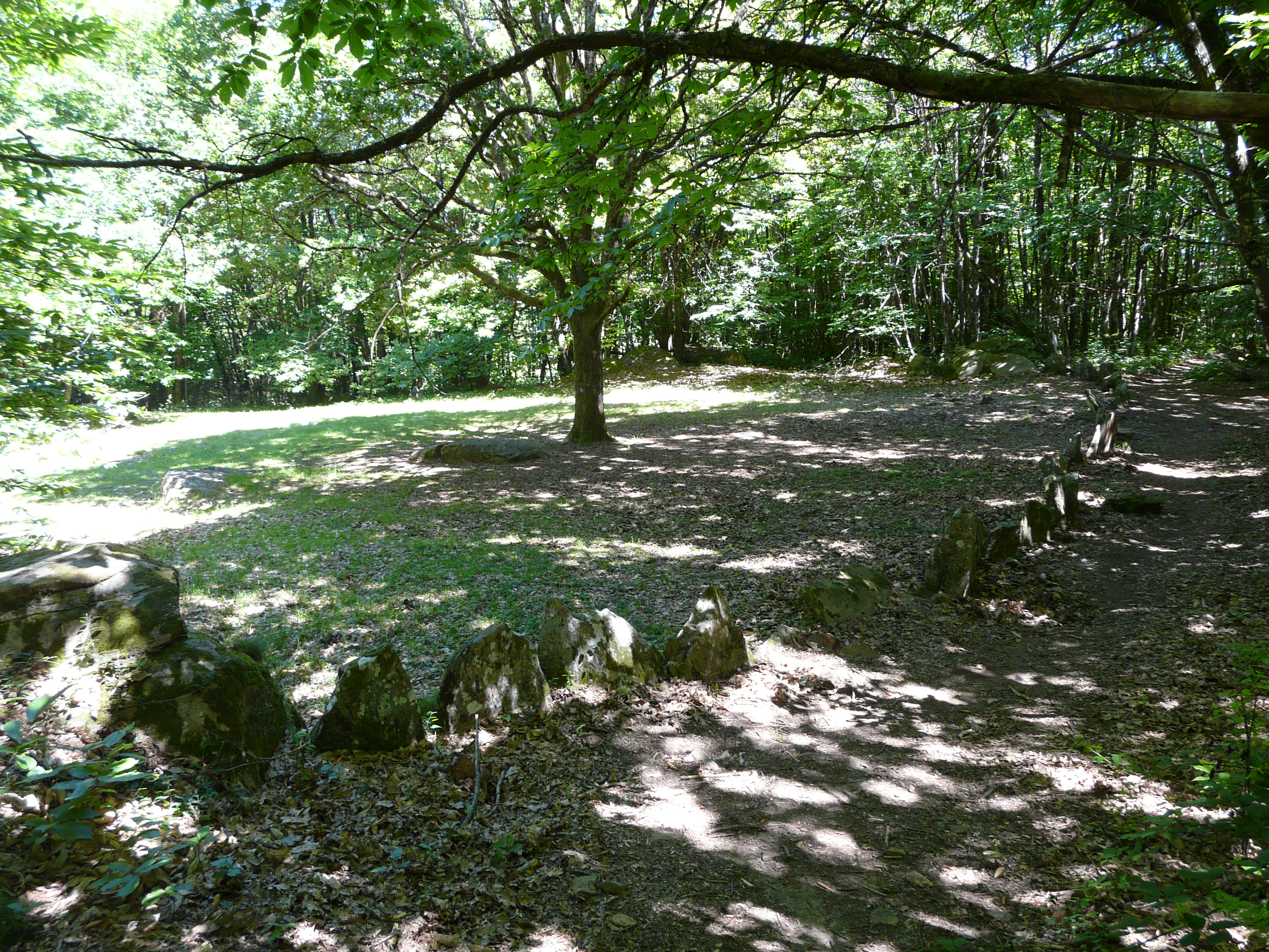 L'alignement de pierres autour du menhir couché (près de l'arbre), cromlech du Puy de Pauliac, Aubazines, France.